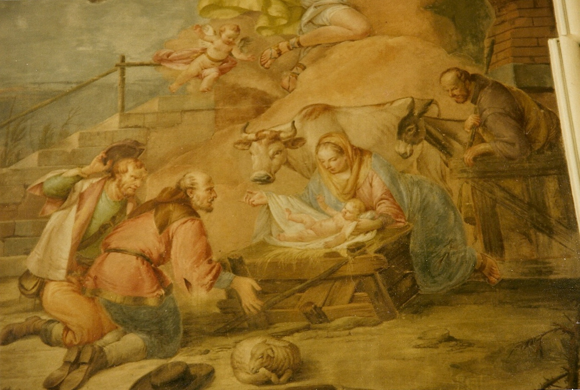 detail